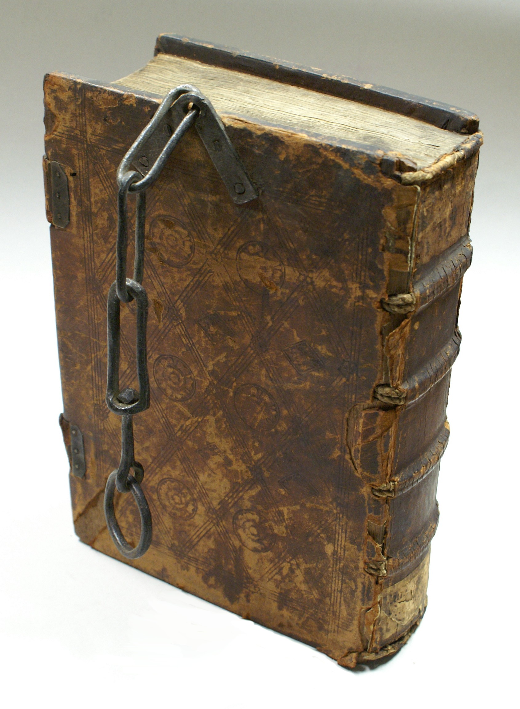 Kettenbuch, ex-bibliotheka gymnasii altonani